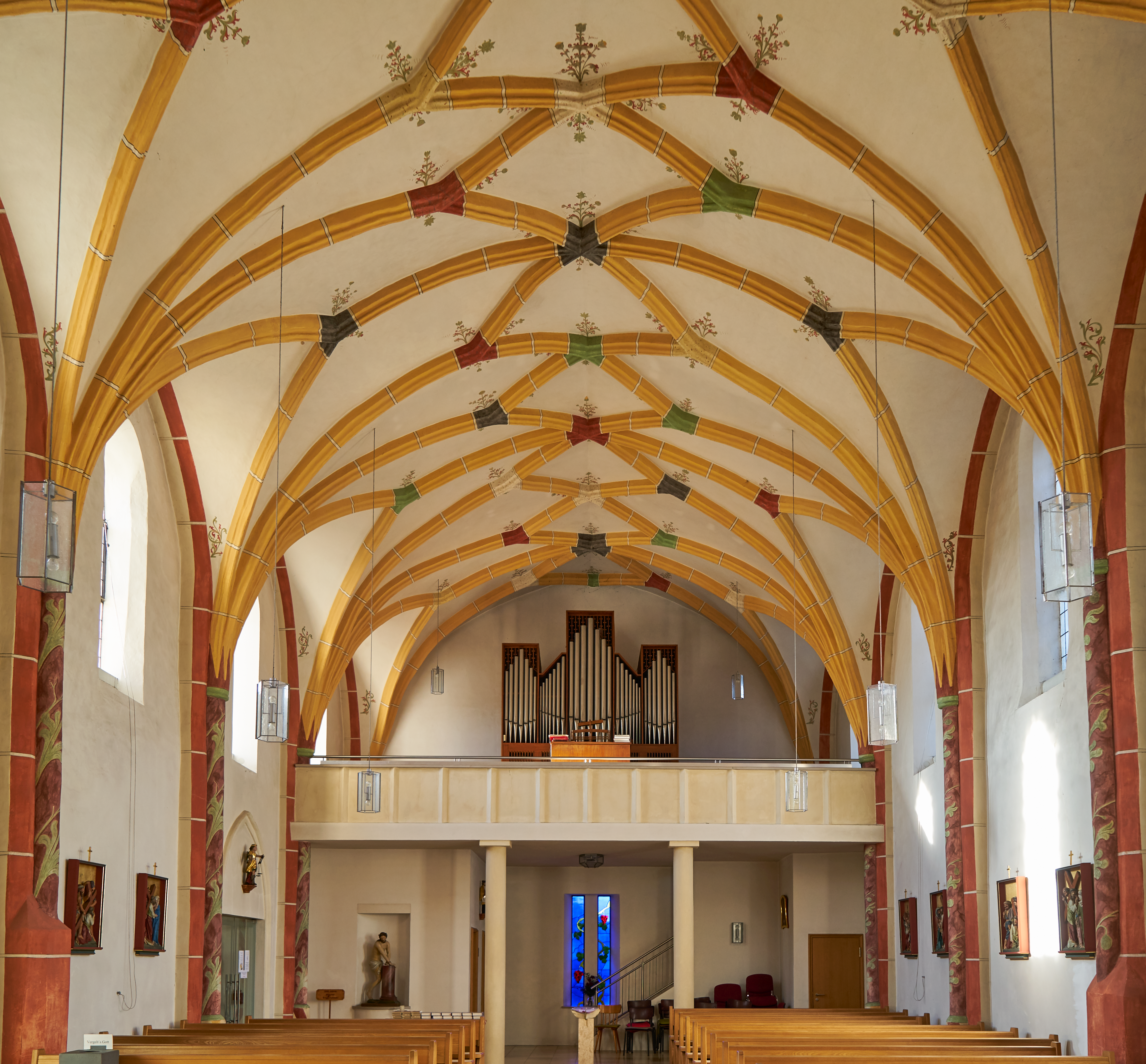 Katholische Pfarrkirche St. Michael, Saalkirche mit eingezogenem Polygonalchor, Chorflankenturm, Vorzeichen und zweigeschossiger Sakristei unter Schleppdach, die nordöstliche Langseite mit Strebepfeilern, spätgotisch, Mitte 15. Jahrhundert, unter Verwendung des älteren Turms, Turmobergeschoss 1754; mit Ausstattung.